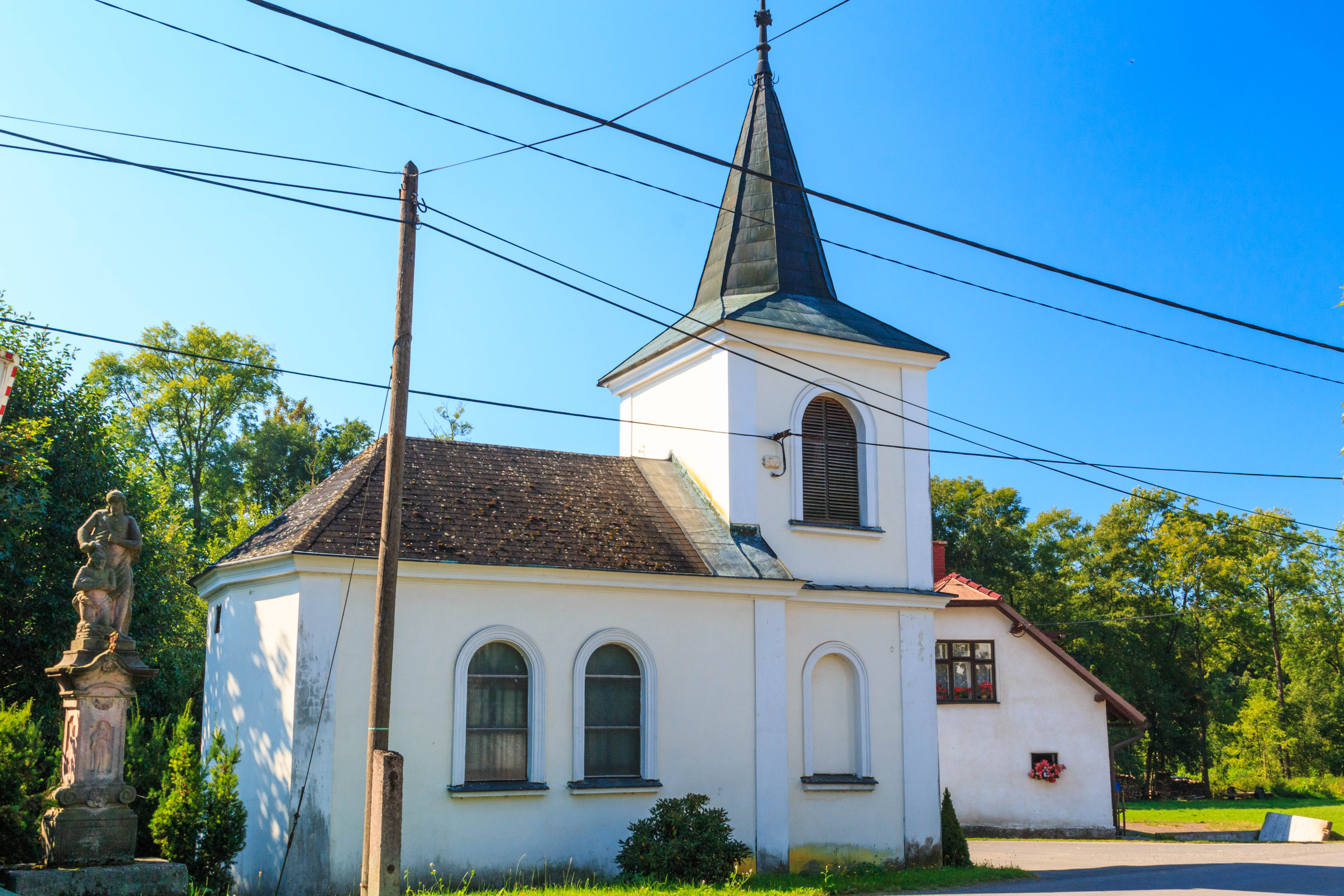 Veselá u Rovenska pod Troskami - kaple